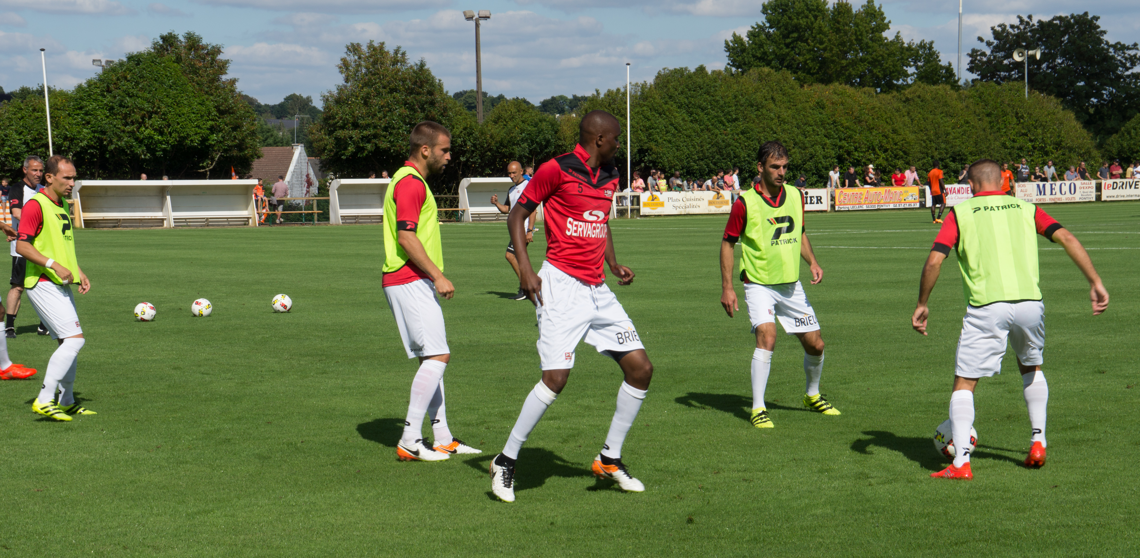 Guingamp-Lorient le 23 juillet 2016 - échauffement